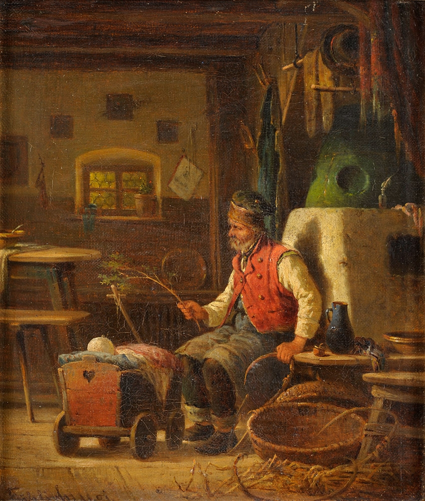 Ein engagierter Großvater. Signiert. ÖL/Lwd., 27 x 23 cm